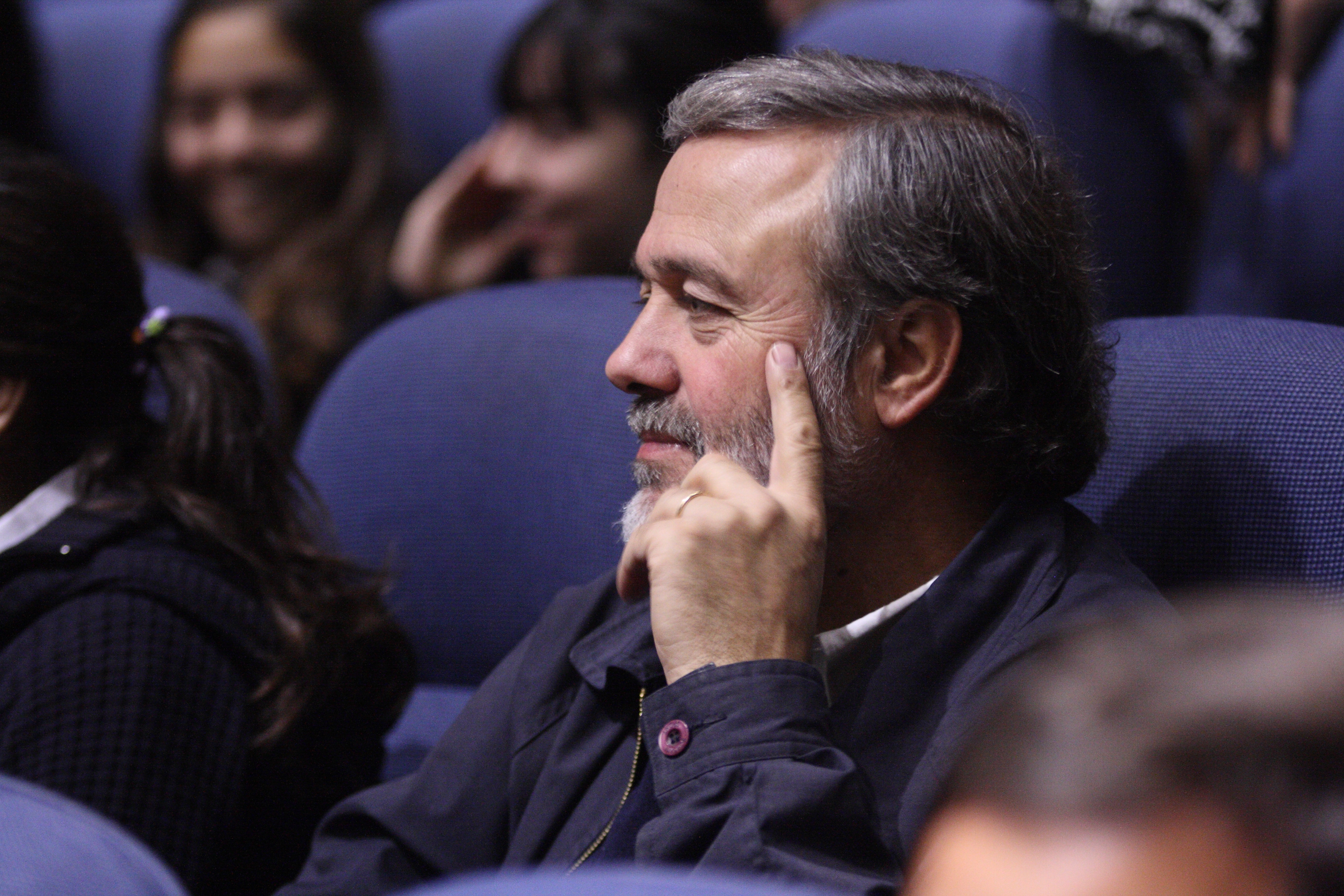 En el auditorio de Telefónica y frente a representantes de medios de comunicación, agencias de publicidad, colegios y alumnos de distintos establecimientos educacionales, la directora de la Biblioteca del Congreso, Soledad Ferreiro, recibió el galardón del segundo lugar obtenido por la página del Torneo Delibera en la categoría Internet juvenil de los premios Queveo.